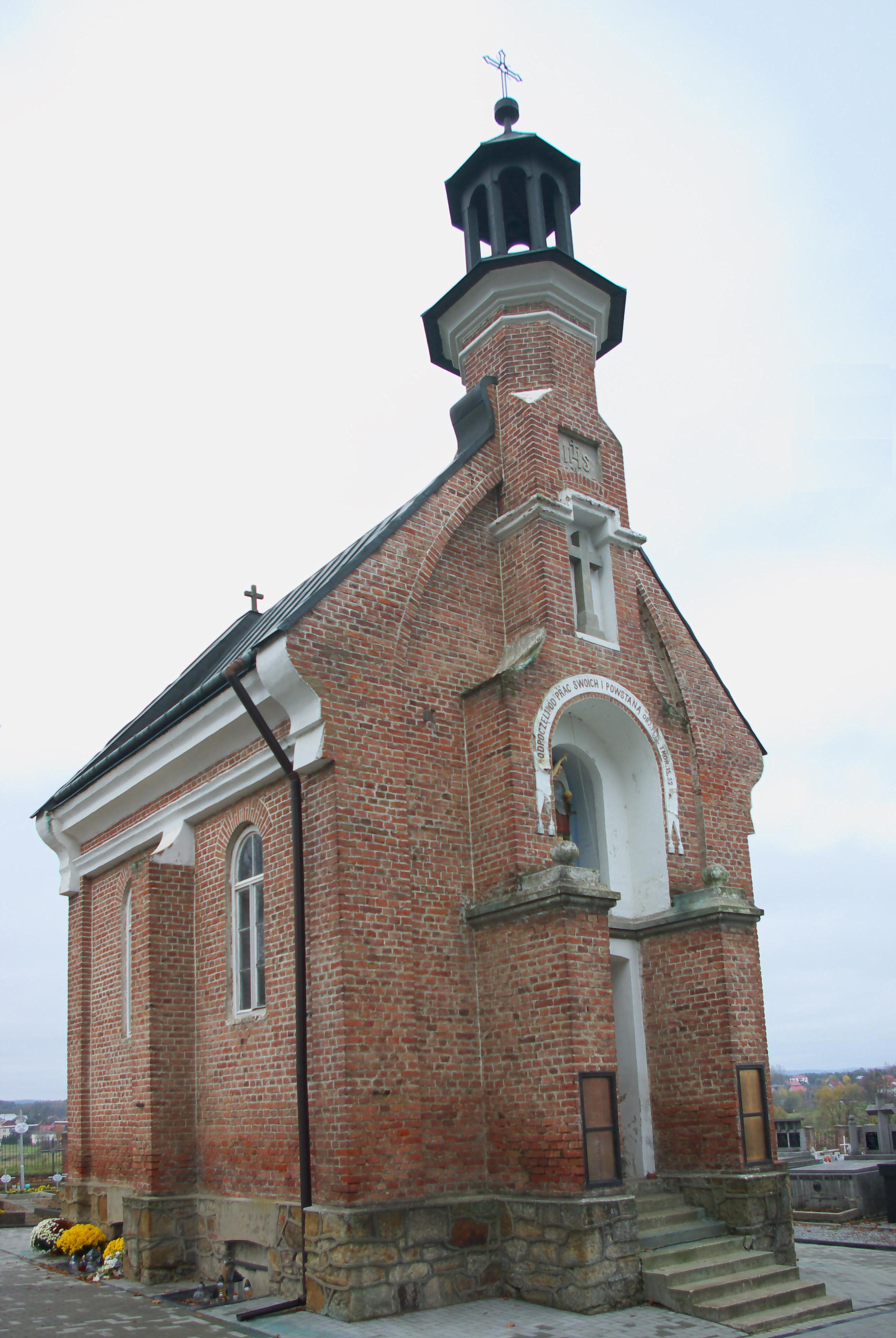 Kaplica grobowa zakonników z Towarzystwa Jezusowego na Cmentarzu w Starej Wsi (2017).